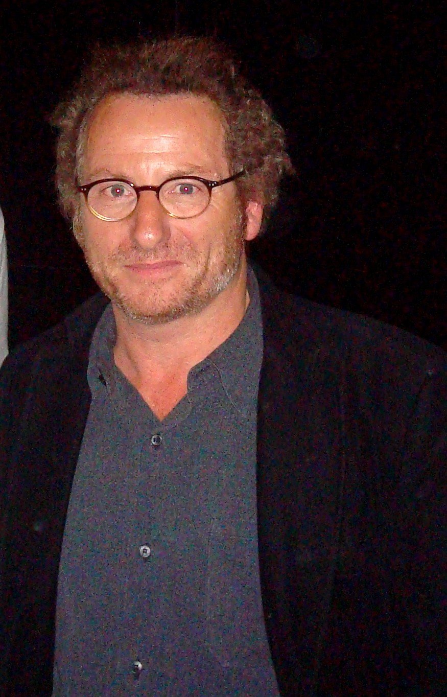 Le directeur de la photographie Guillaume Schiffman à Rennes, en 2011.